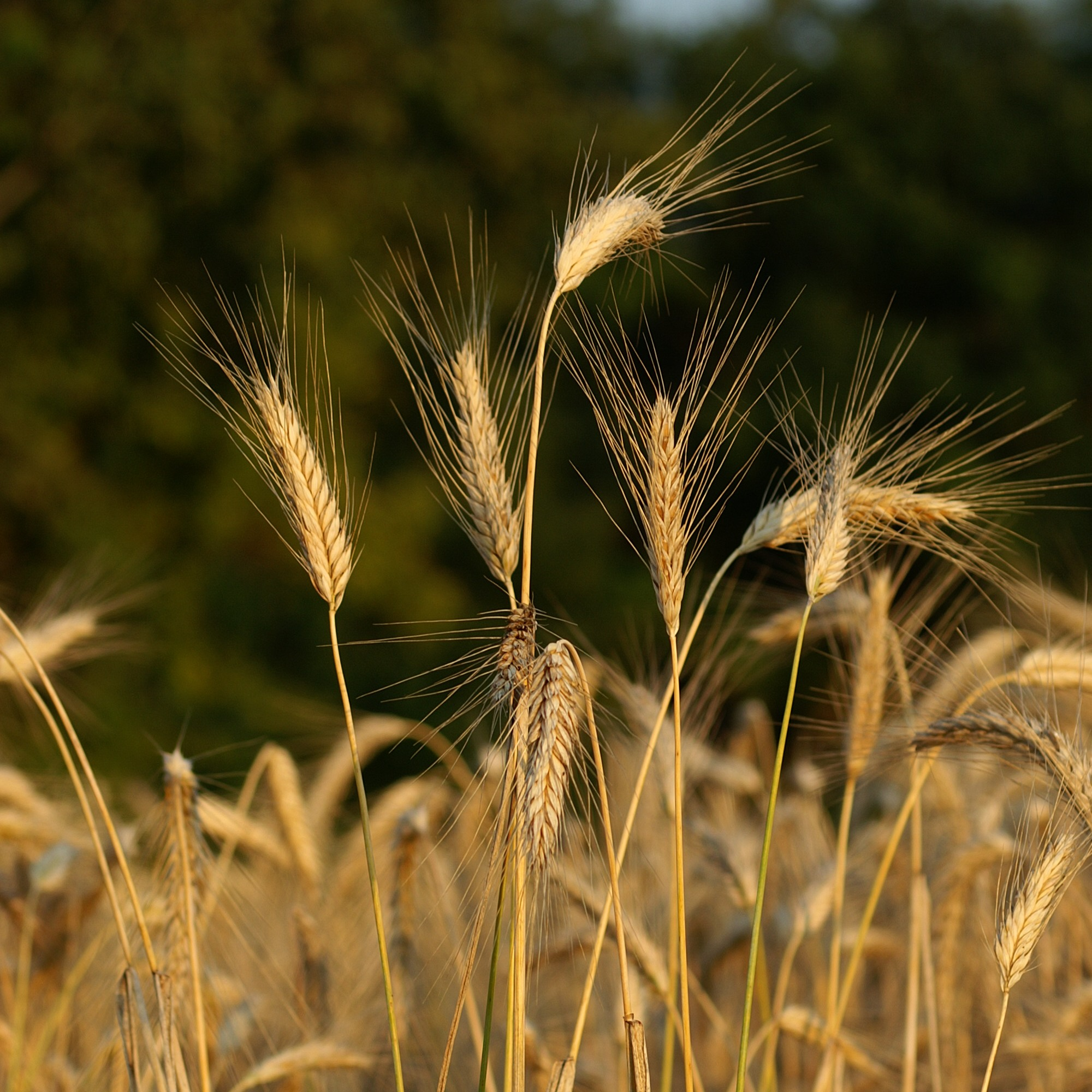 Mit Weizen wird eine Reihe von Arten der Süßgräser (Poaceae) in der Gattung Triticum L. bezeichnet. Im Bild: Weizenähren der Sorte Triticum polonicum L..